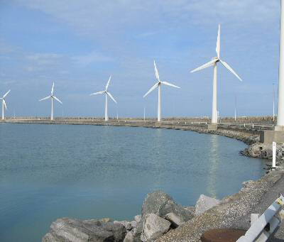 Gefotografeerd door Tim Bekaert (1/4/2004)